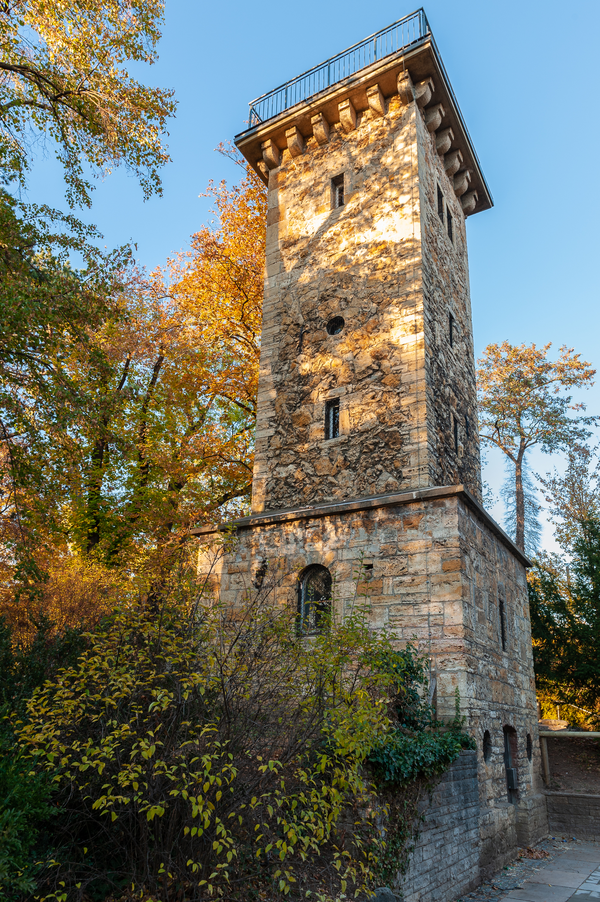 Daimlerturm im Kurpark Stuttgart-Bad Cannstatt